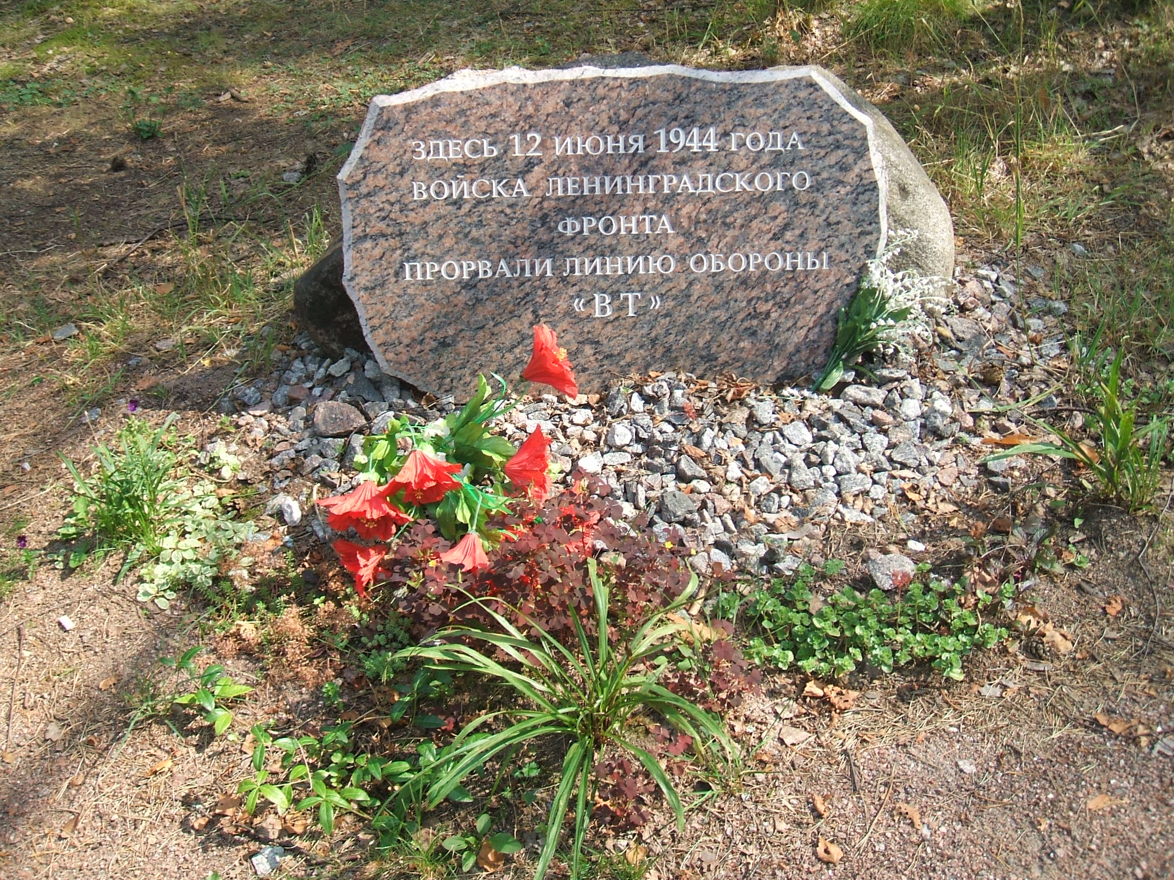 Памятный знак в п.Молодёжное СПб на Марьиной горе